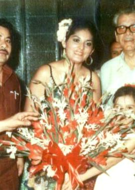 Chayito Valdez en sus inicios.